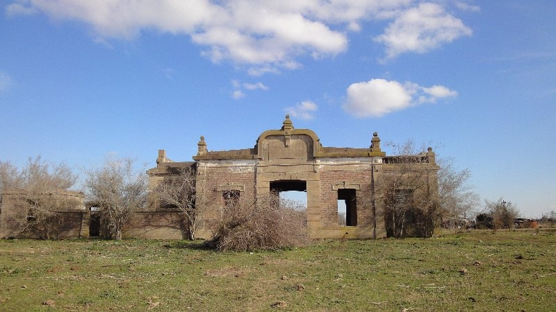 Estación Esquina Negra del ex FFCC CGBA, ramal González Catán - La Plata (KM 88)